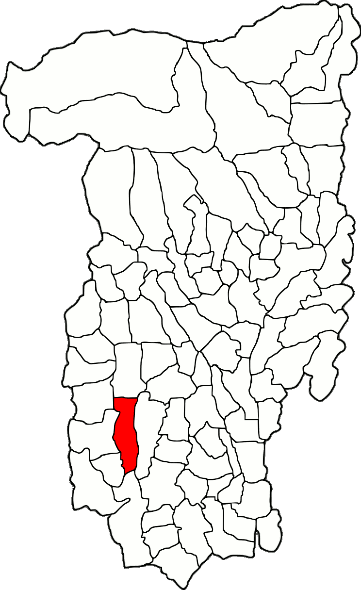 Lage der Gemeinde Tetoiu im Kreis Vâlcea (RO).